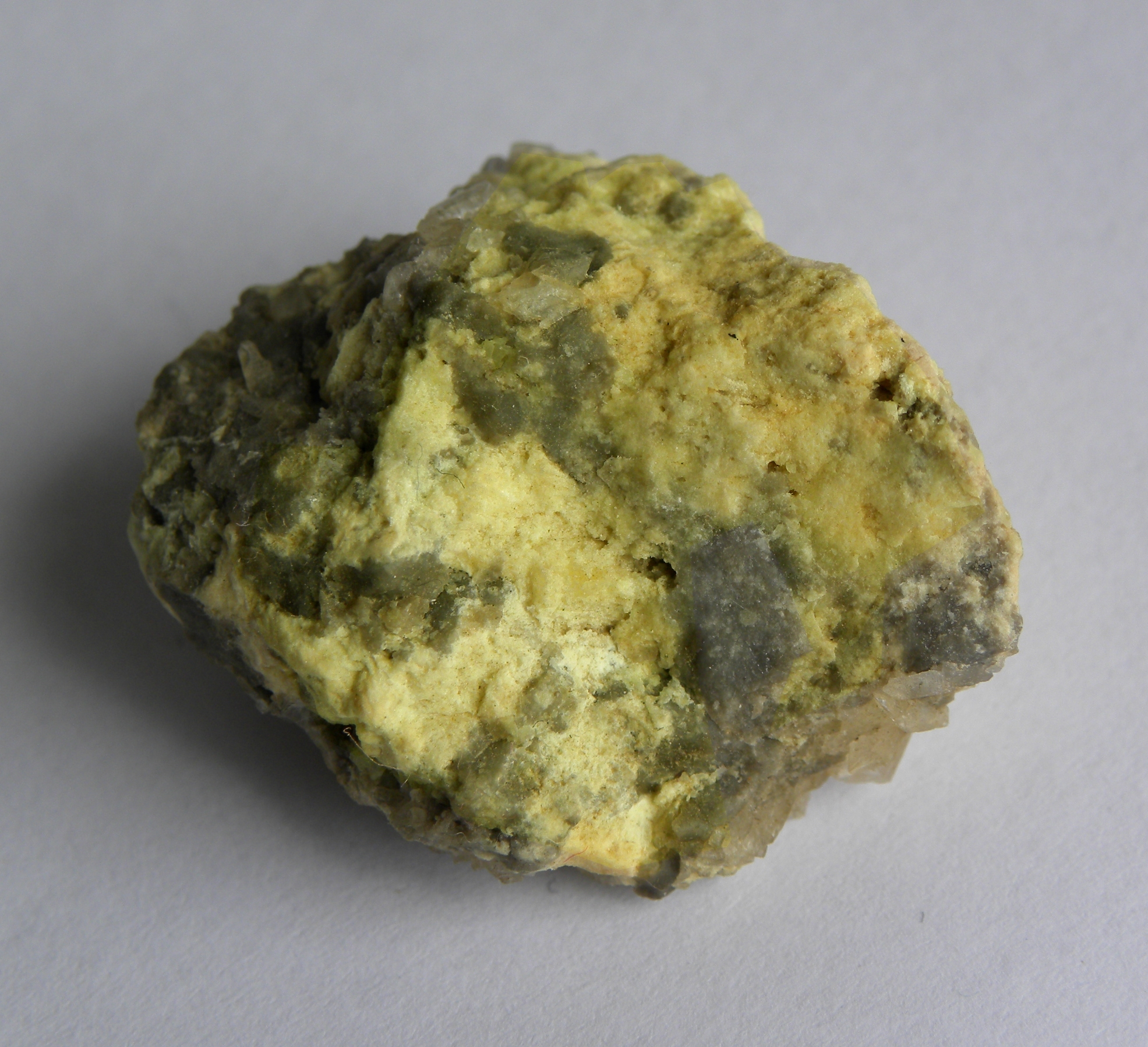 Siarka rodzima